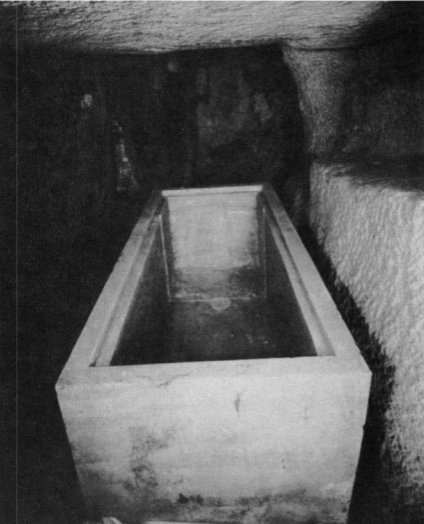 Alabastersarkophag aus dem Grab der Hetepheres (G 7000x), Giza, 4. Dynastie, ca. 2600 v. Chr.